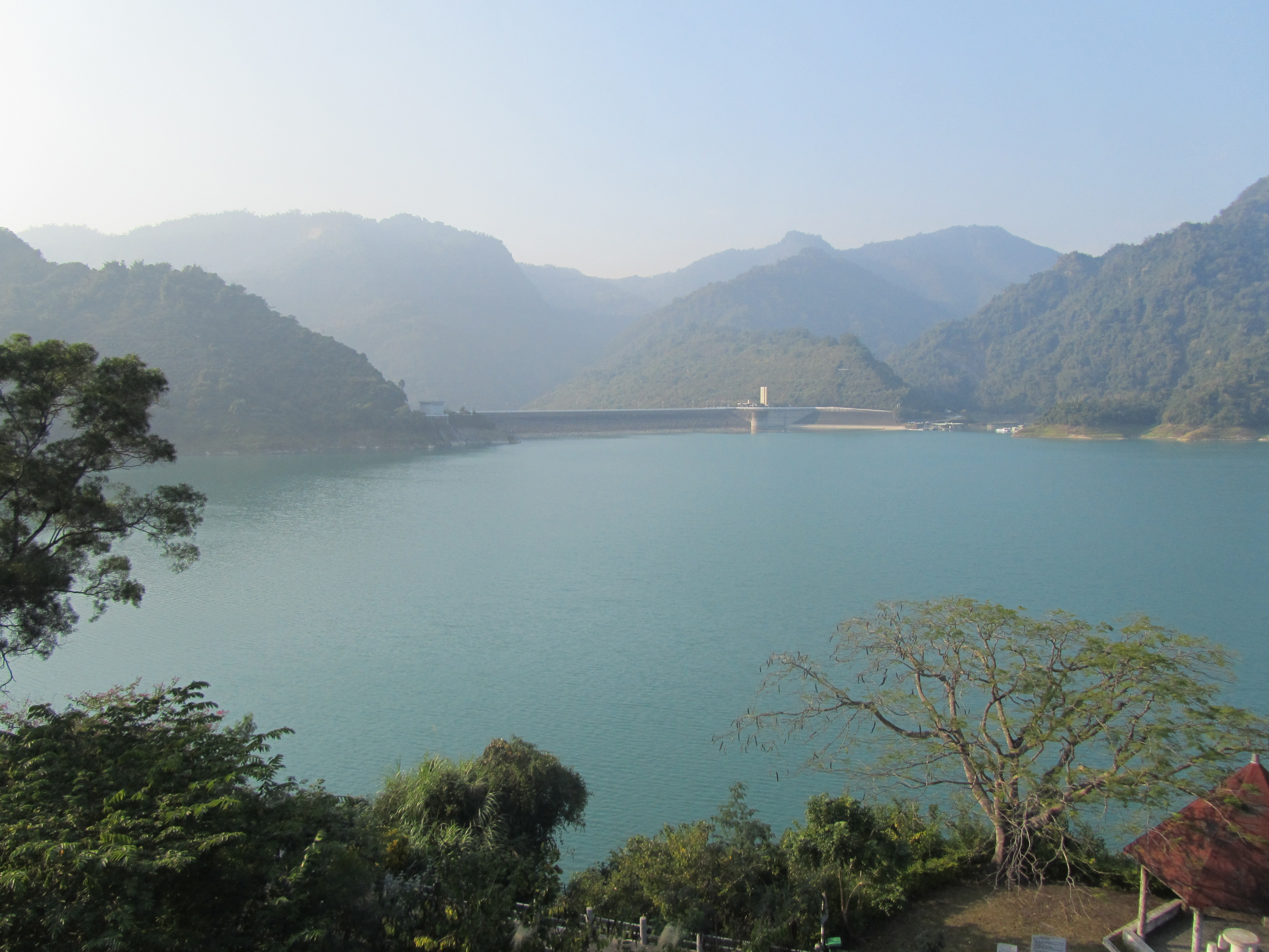 2012年1月30日，自觀景樓遠眺曾文大壩。